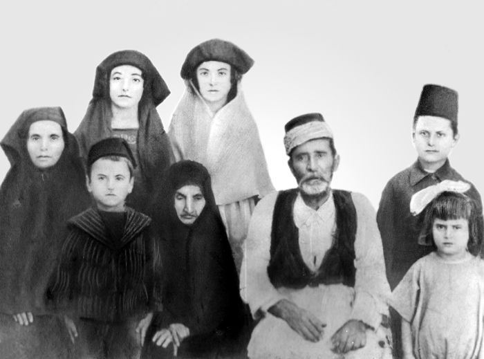 Mübadil Bölge: Kandiye/GİRİT İskan Bölgesi: Çeşme/İZMİR [Demir Efendi, eşi Fatma Hanım, oğulları Hüseyin, Ahmet (Gencer), kızları İsmet (Gencer), Mefharet (Gencer) Akıncılar, Nebahat (Gencer) Gönülşen ve çocukların babaannesi]